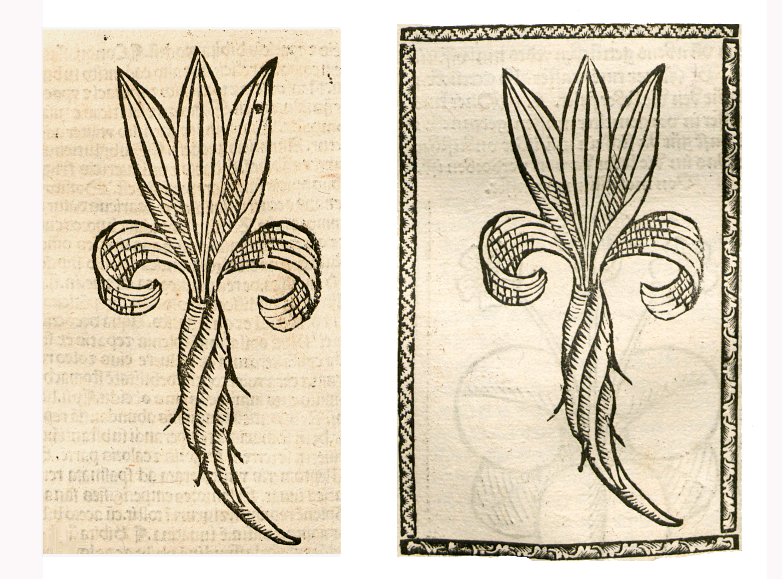 Abbildung von: Menwel Wurtzel (Rumex obtusifolius)